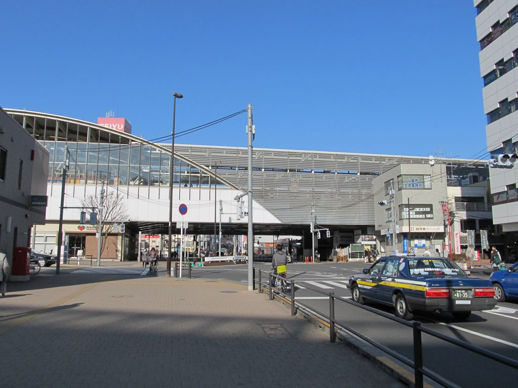 武蔵小金井。小金井市東京都。